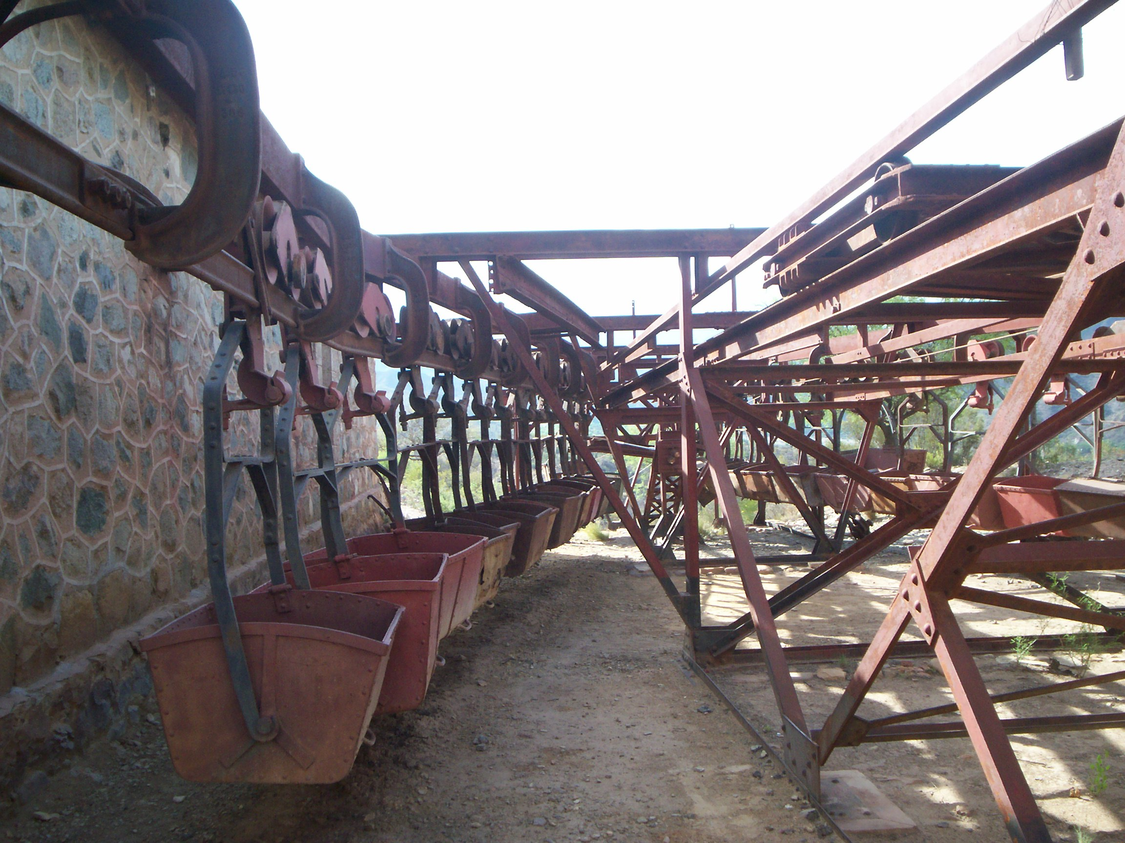 Cablecarril minero - Mina La Mejicana (Chilecito, Argentina) - Estación II, vista de salida de vagonetas hacia la estación III